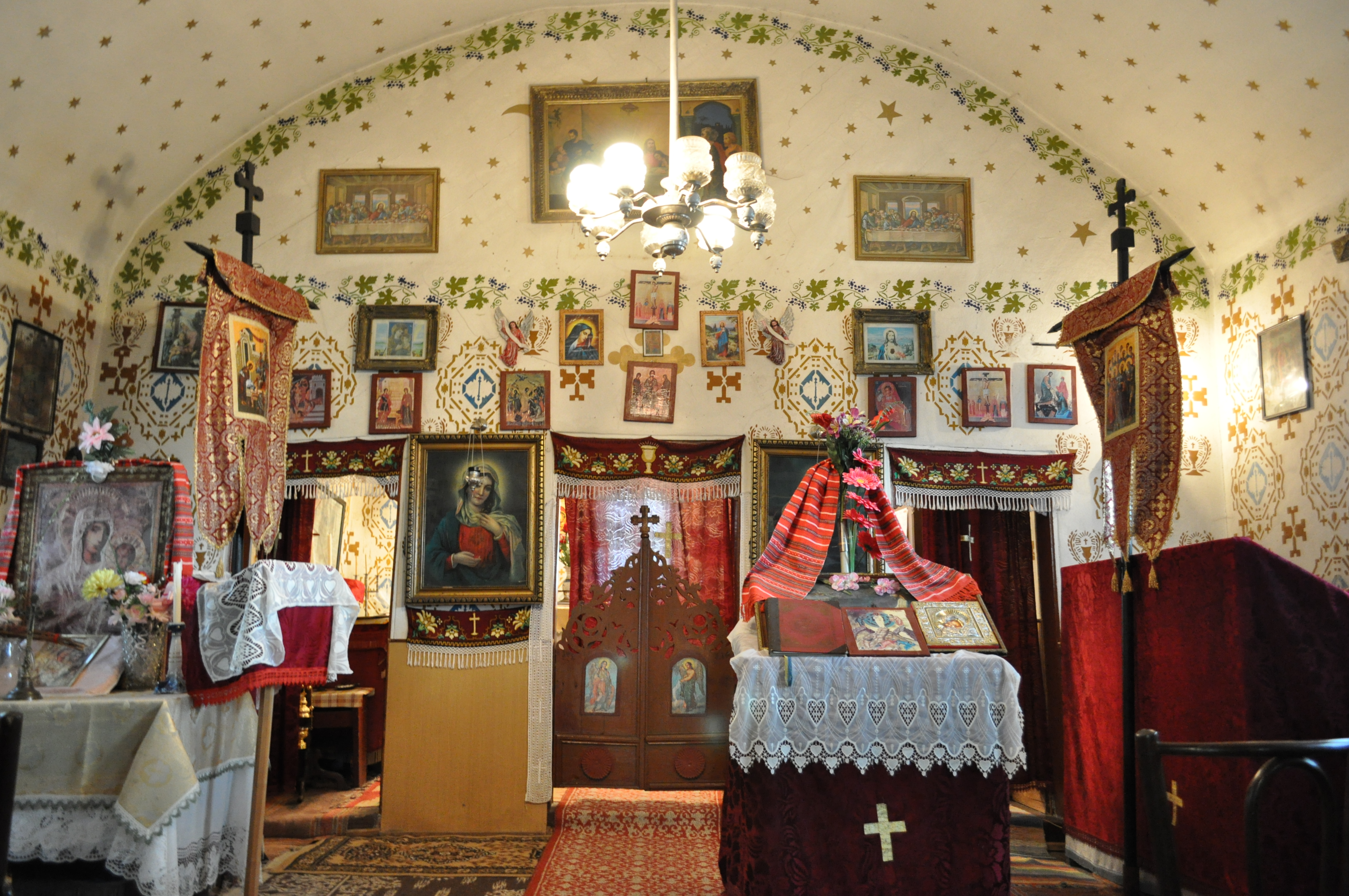 Biserica de lemn din Ciurila, județul Cluj